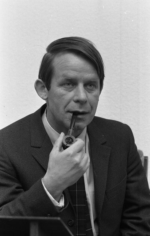 Dichterlesung Siegfried Lenz in der Landesvertr. Hamburg